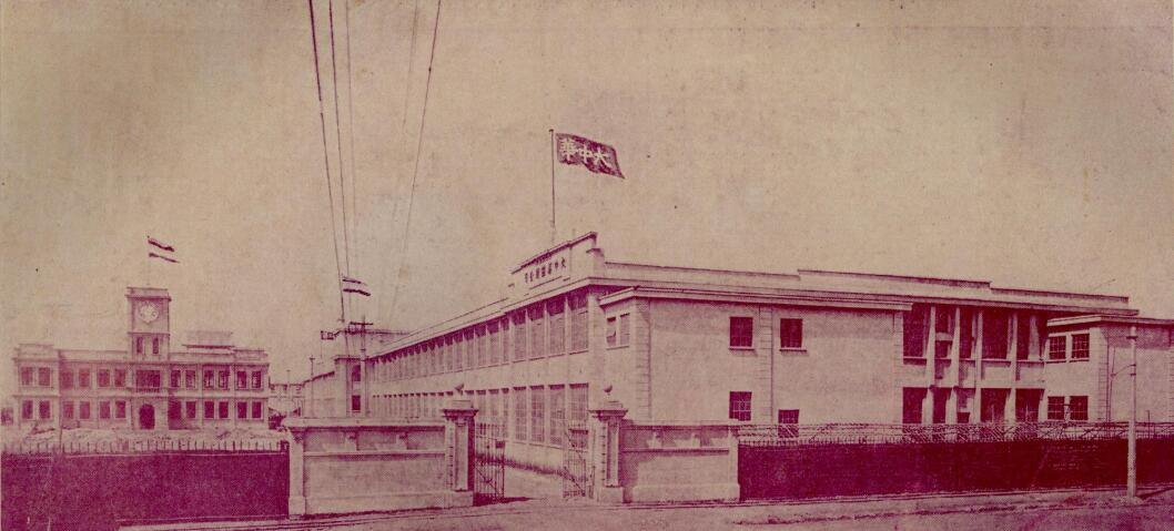 题名： 大中華紗廠：[照片] 文献来源： 《华商纱厂联合会季刊》 出版时间： 1922 年 卷期(页)： [ 第3卷 第2期 ，230页 ]